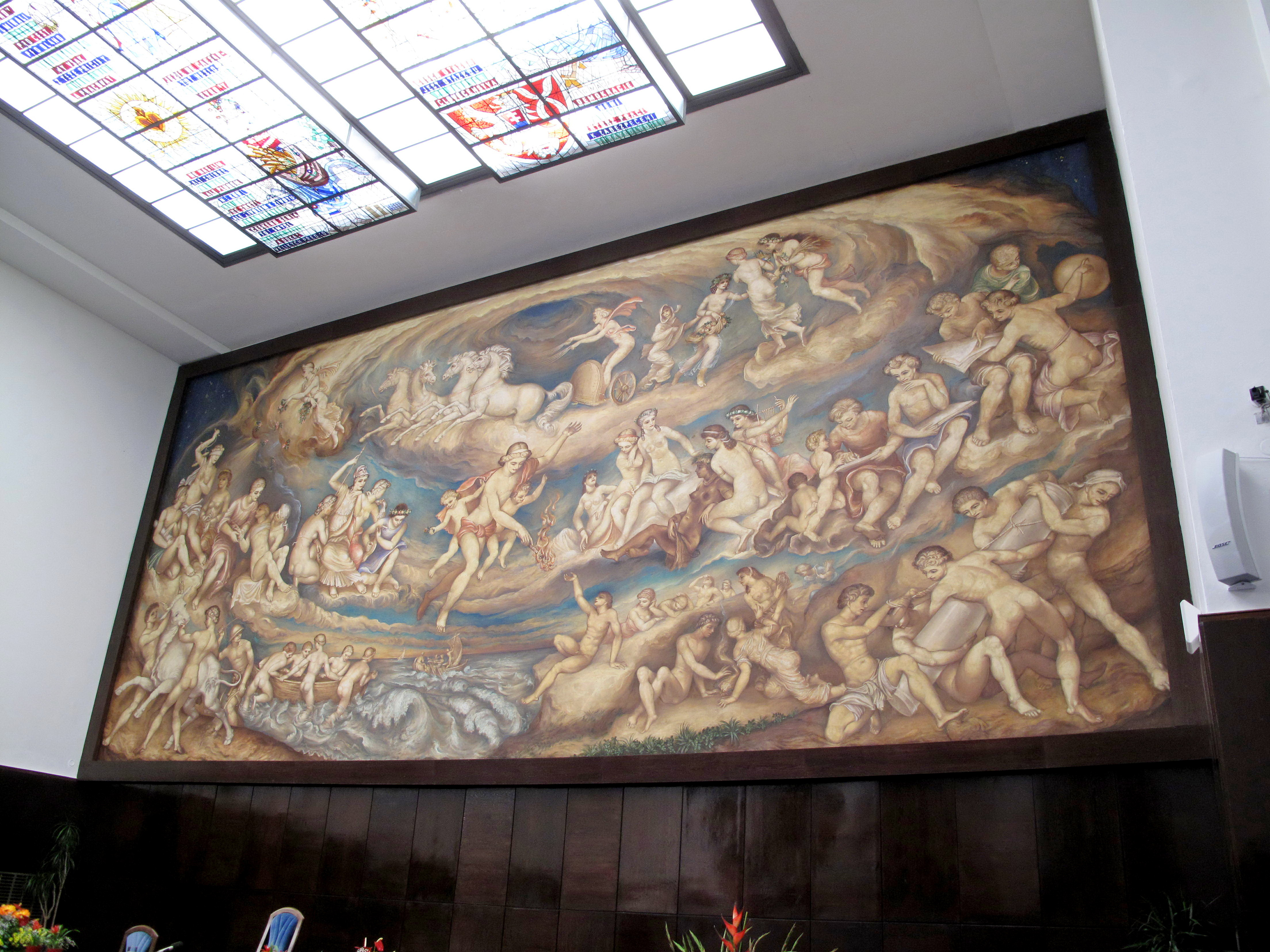 Malba Prométheus přinášející lidstvu oheň v aule Právnické fakulty Masarykovy univerzity. Autor Antonín Procházka.